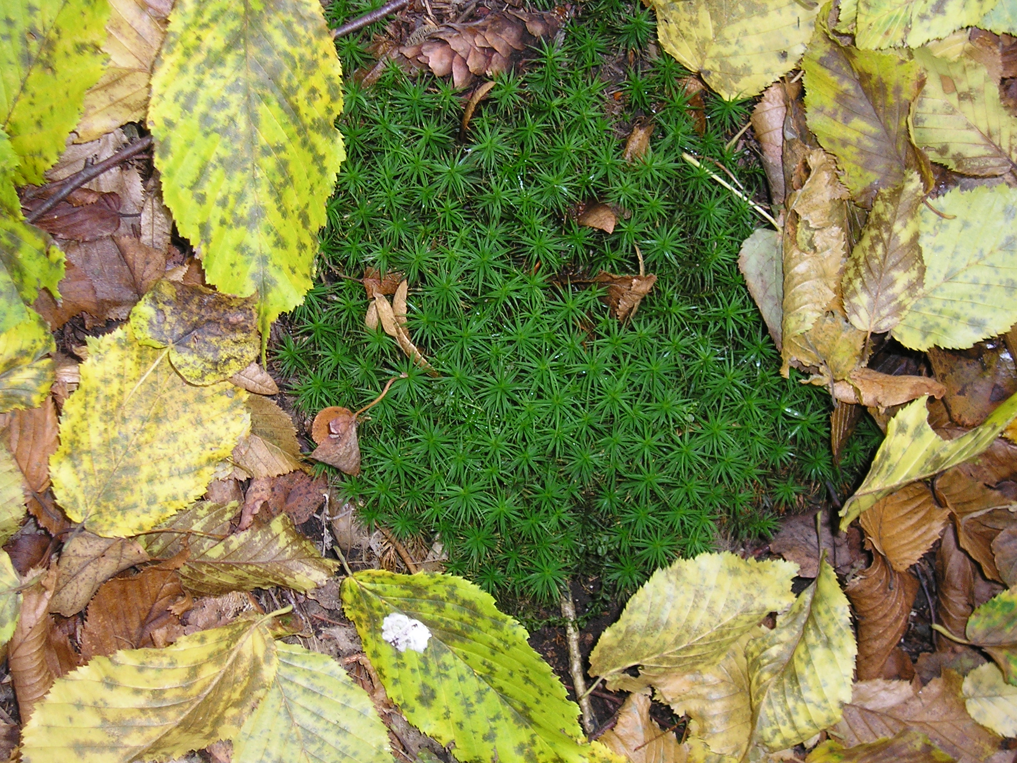 Zástupce mechů (Bryophyta) rod ploník (Polytrichum).